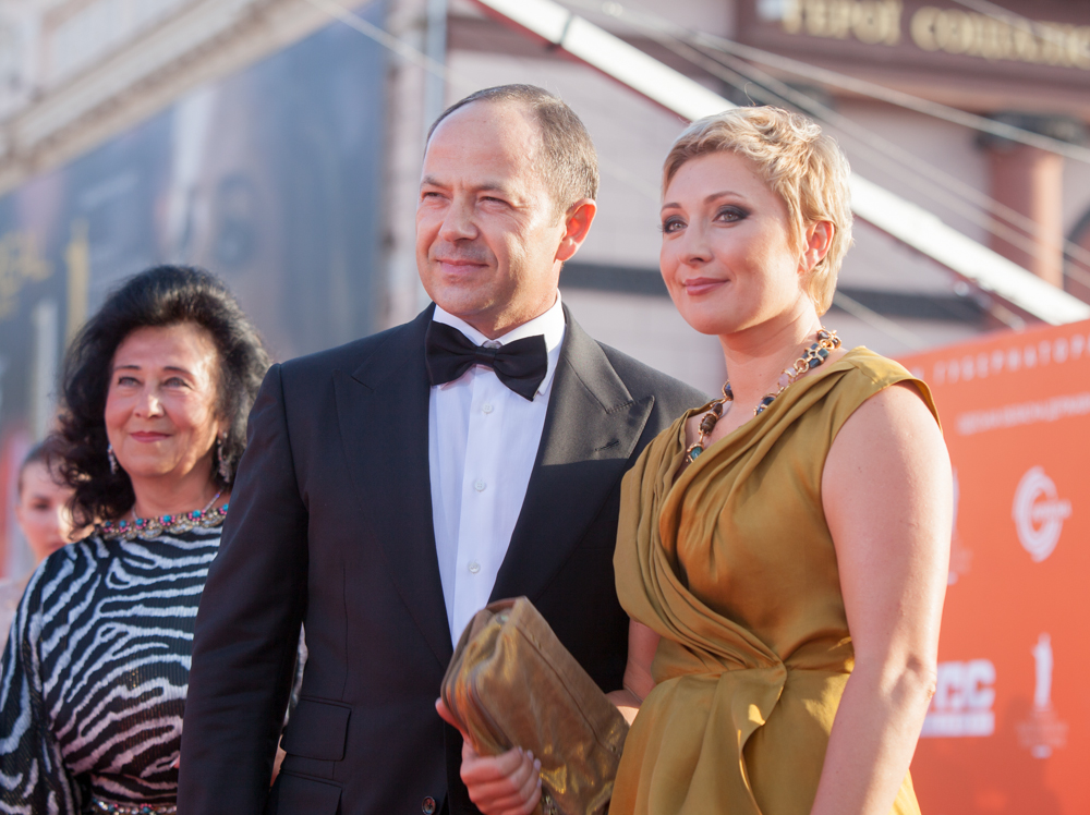 Відкриття 4-ого одеського міжнародного кінофестивалю: Червона доріжка. Сергій Тігіпко з дружиною.